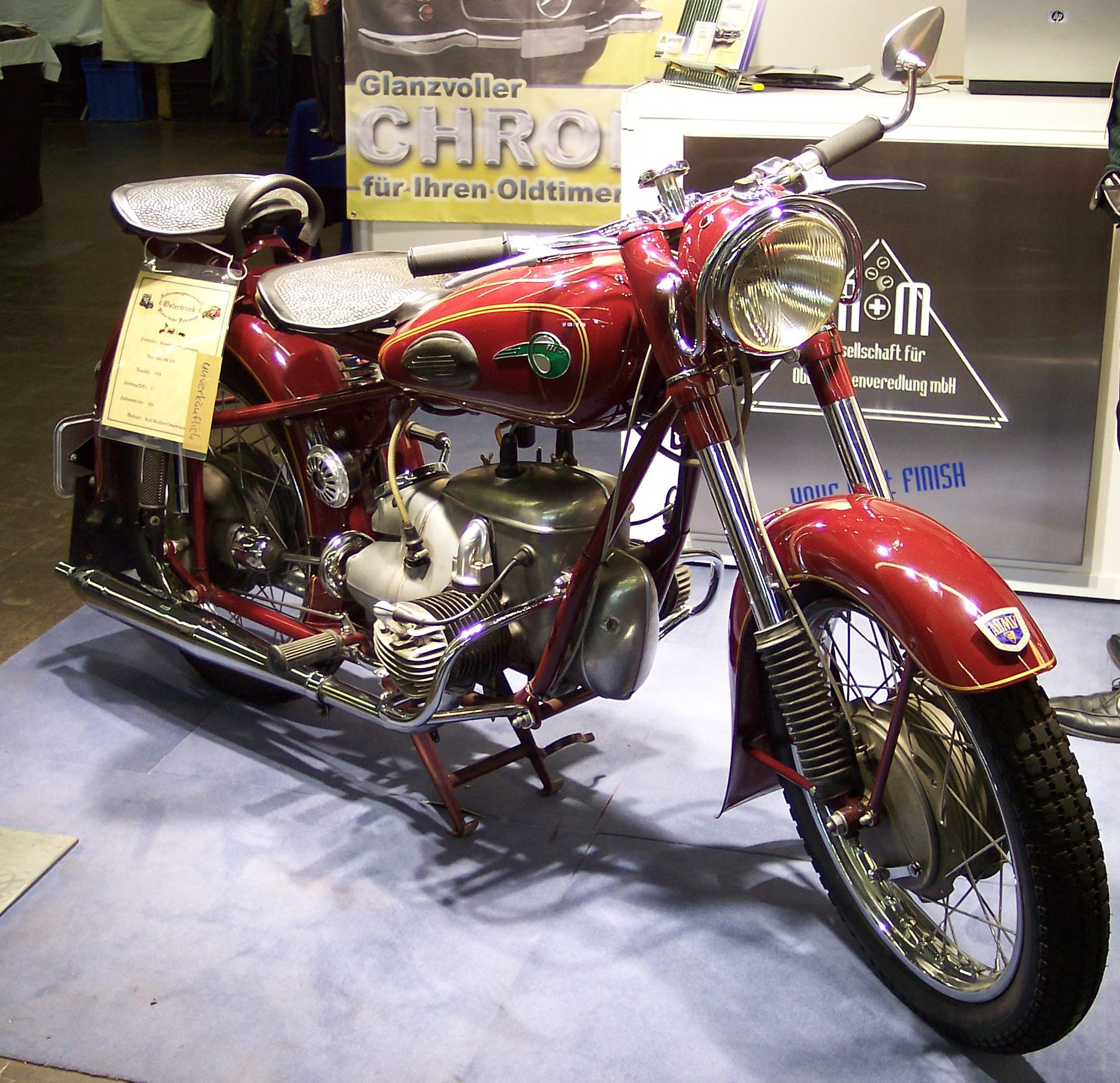 MZ BK 350